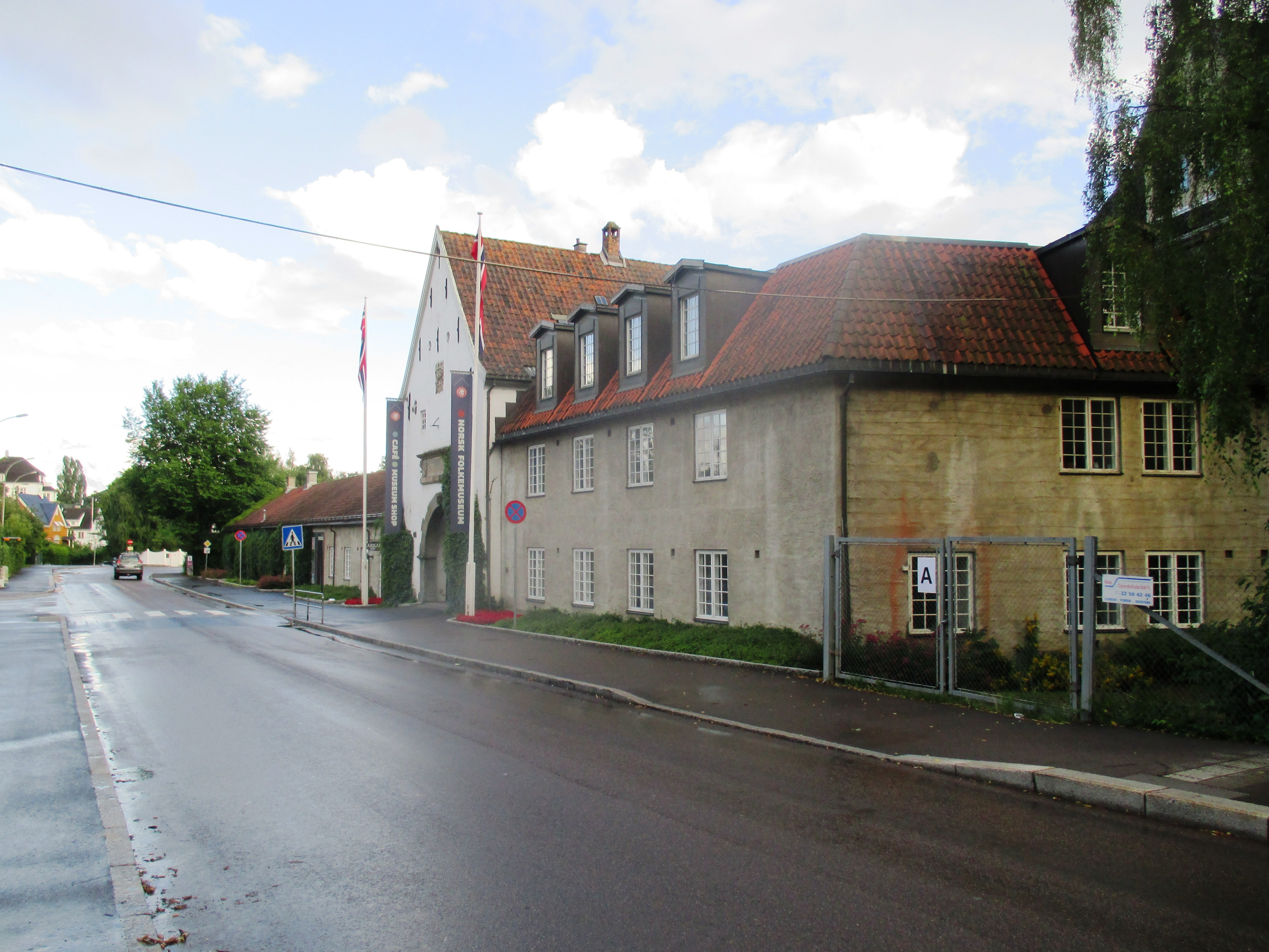 Museumsveien ved Folkemuseet